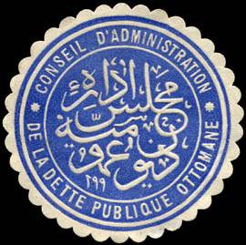 Sealing stamp Title: Conseil d'Administration de la Dette Publique Ottomane Description: blau, weiß, geprägt Place: Dette Publique Ottomane size: 4 cm